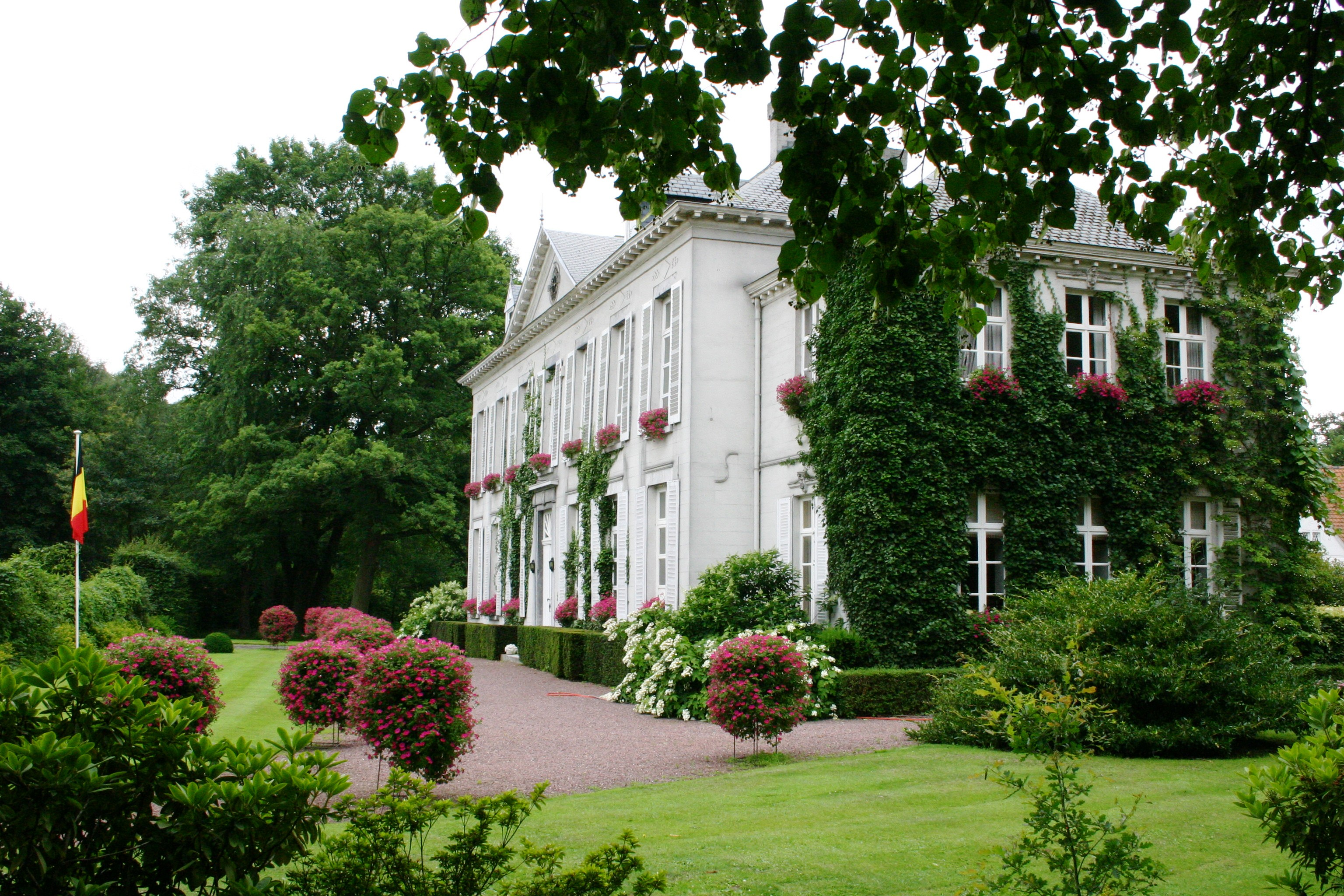 Schlass Terlaemen.